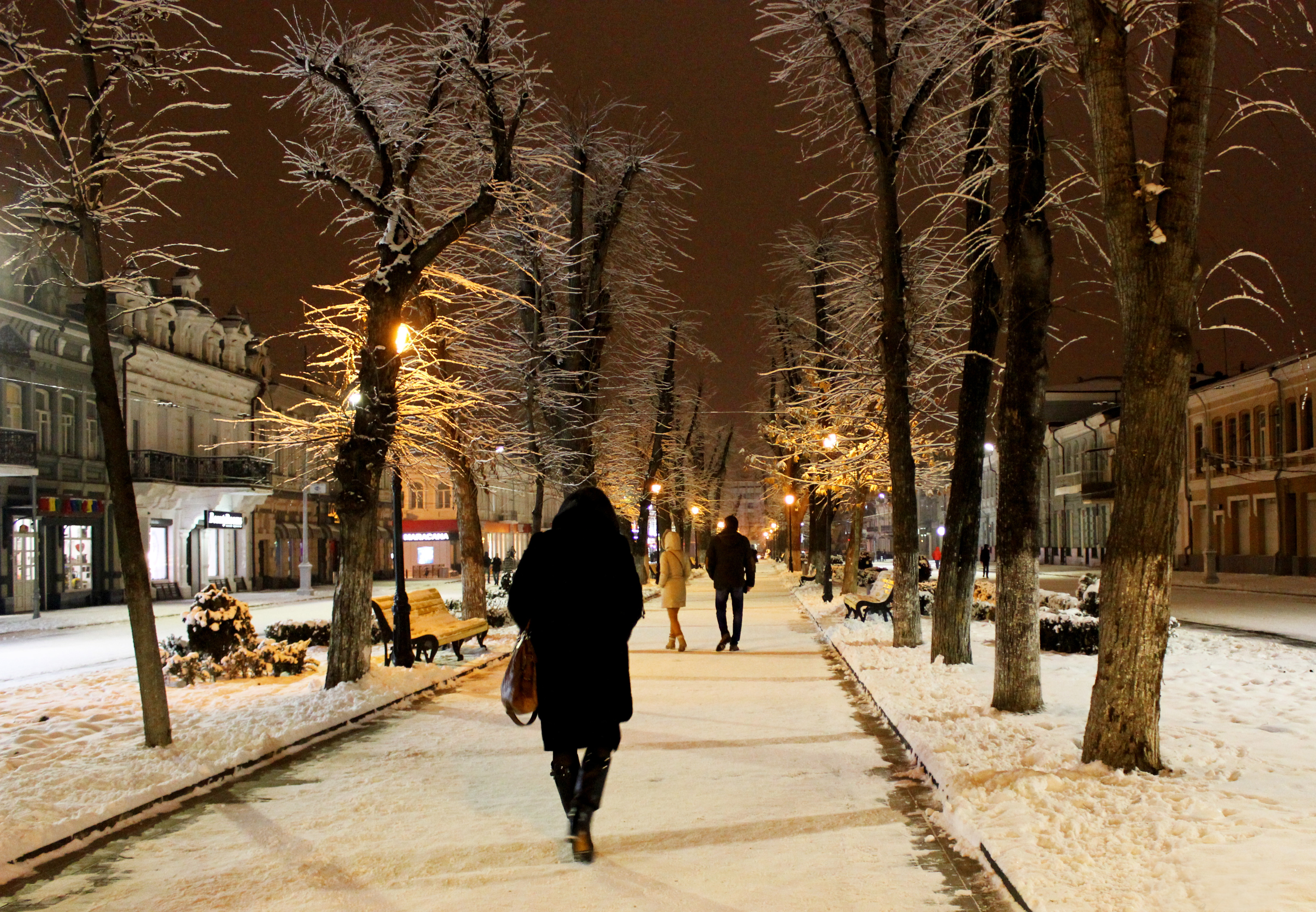 Бульвар на проспекте Мира: пр. Мира, Владикавказ, Северная Осетия This image is related to the protected area of Russia number 1510147